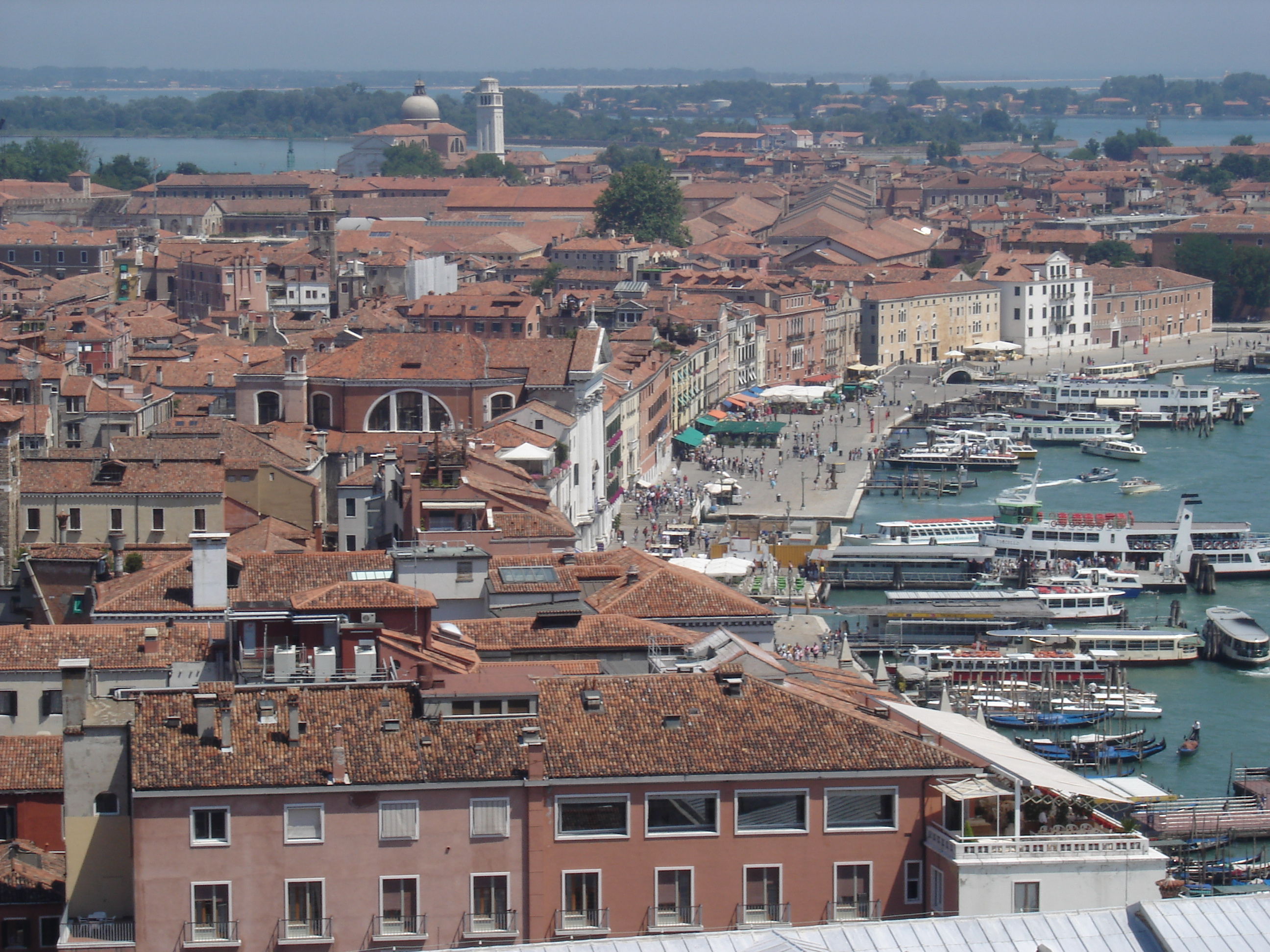 Venice